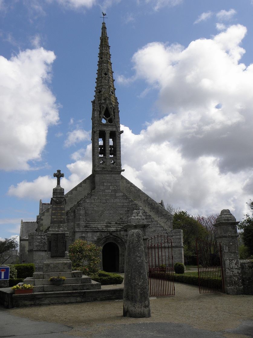 Façade principale de l'église paroissiale de Saint-Jean-Trolimon (29).